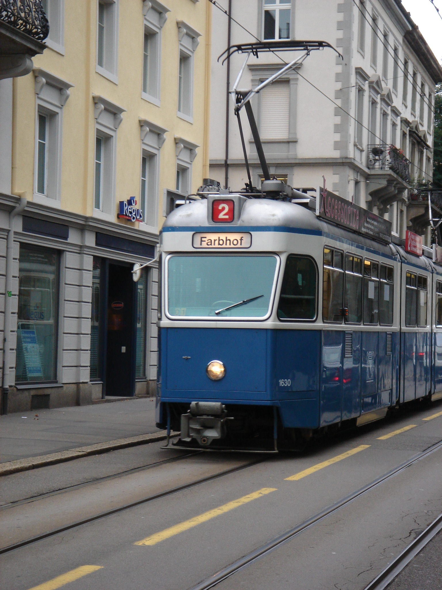 Tram in Zürich, Switzerland